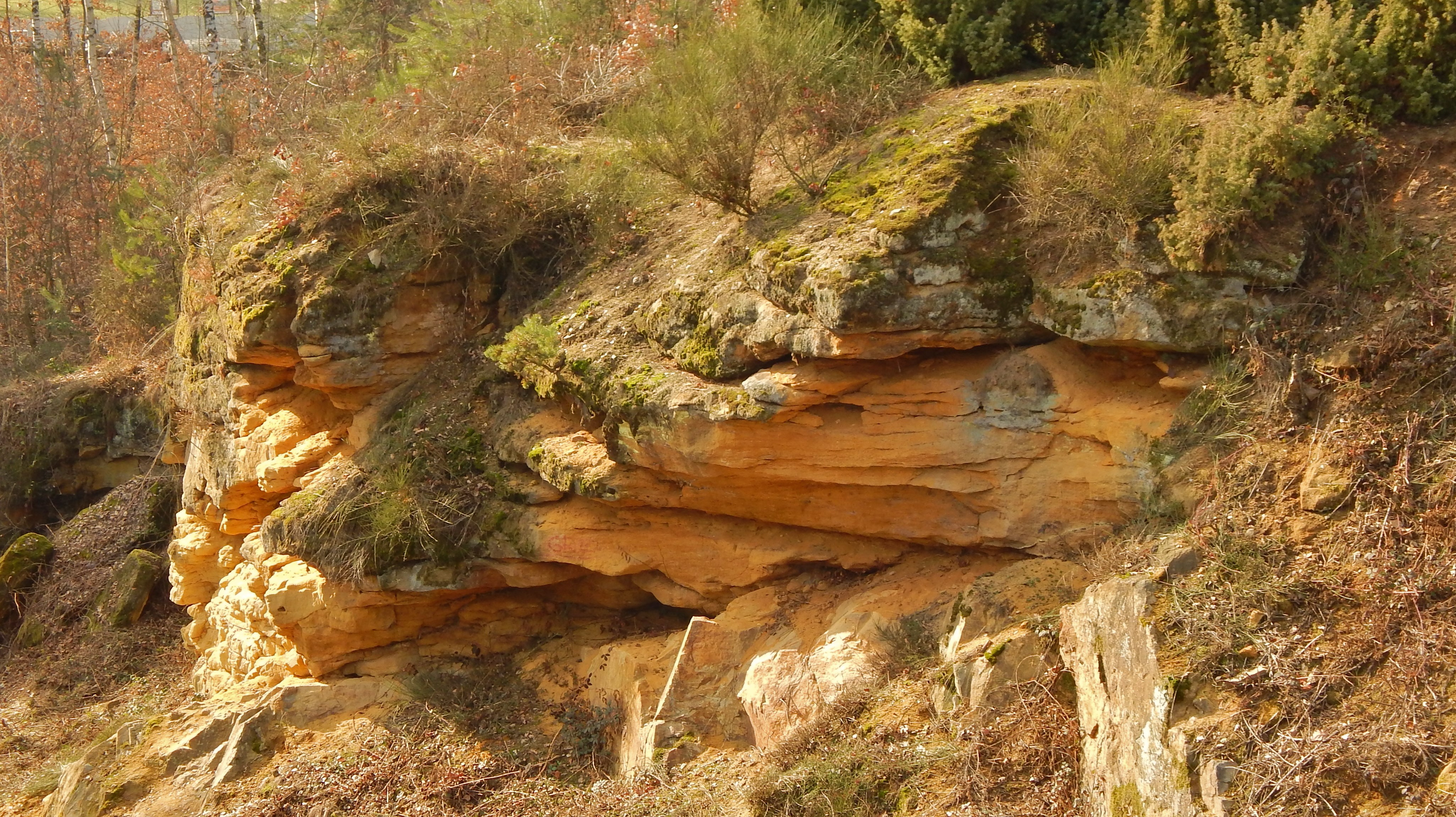 Ukázka skladby pískovce.